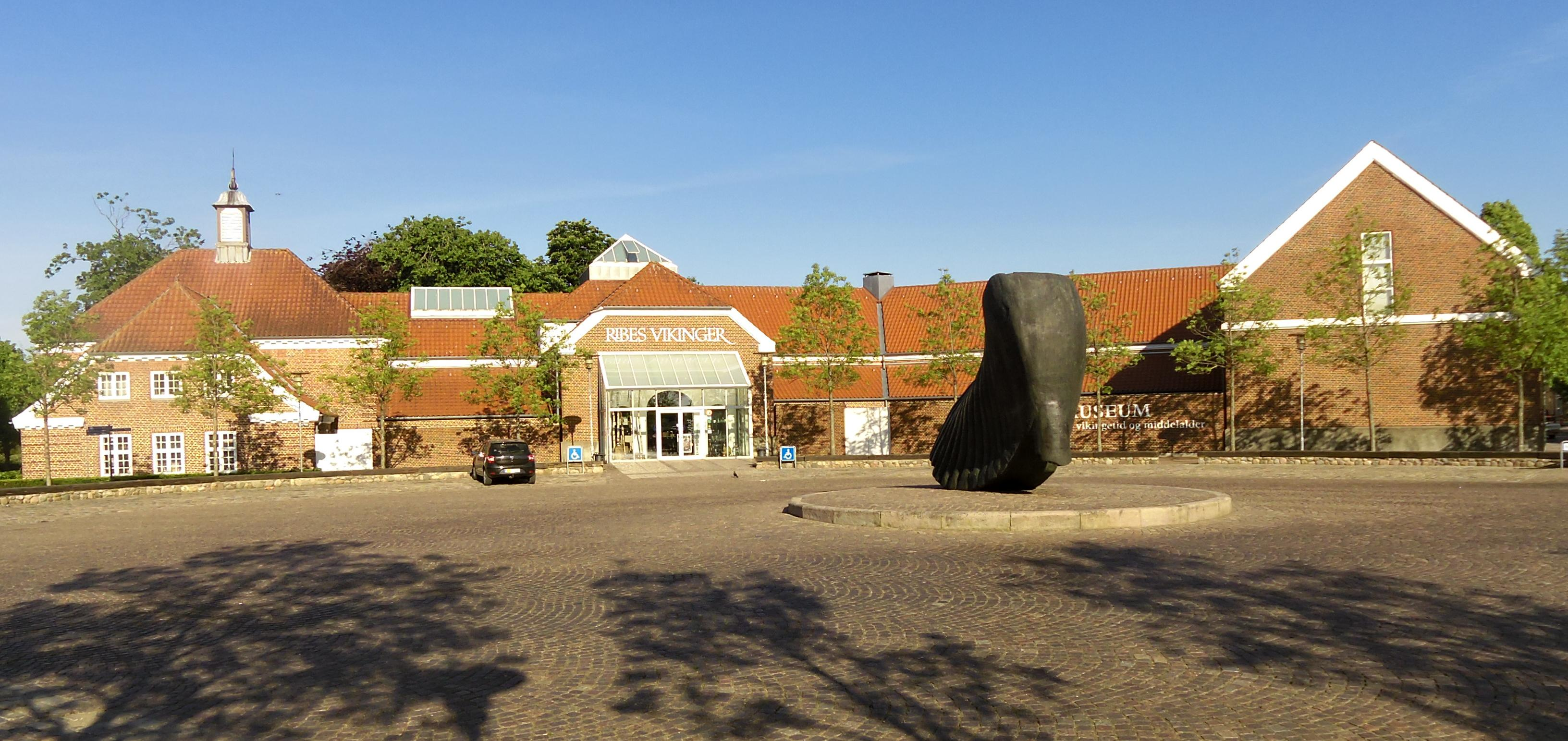 Museet Ribes Vikinger